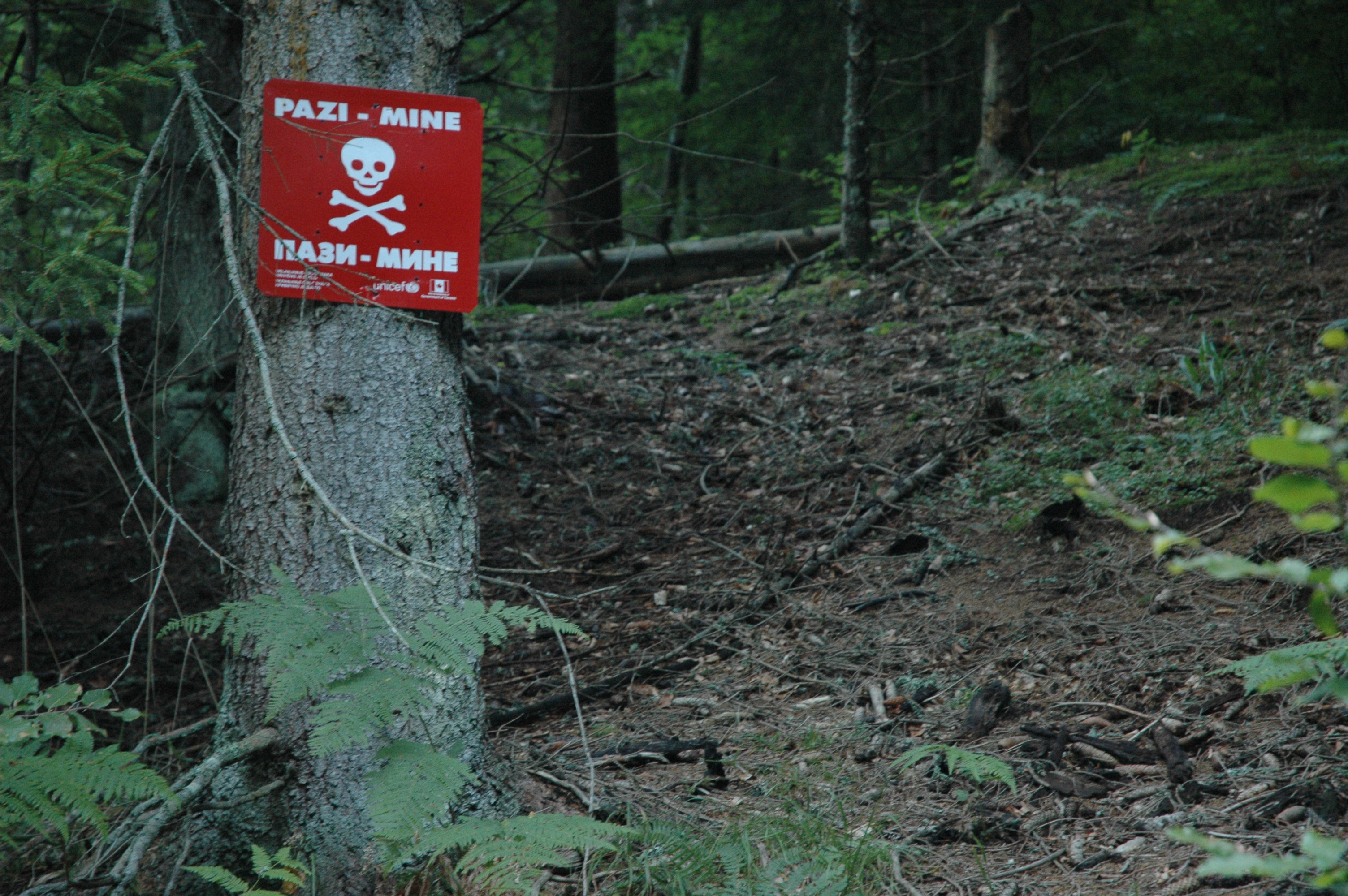 zaminowany las w Bośni, pomiędzy miastami Jajce i Travnik